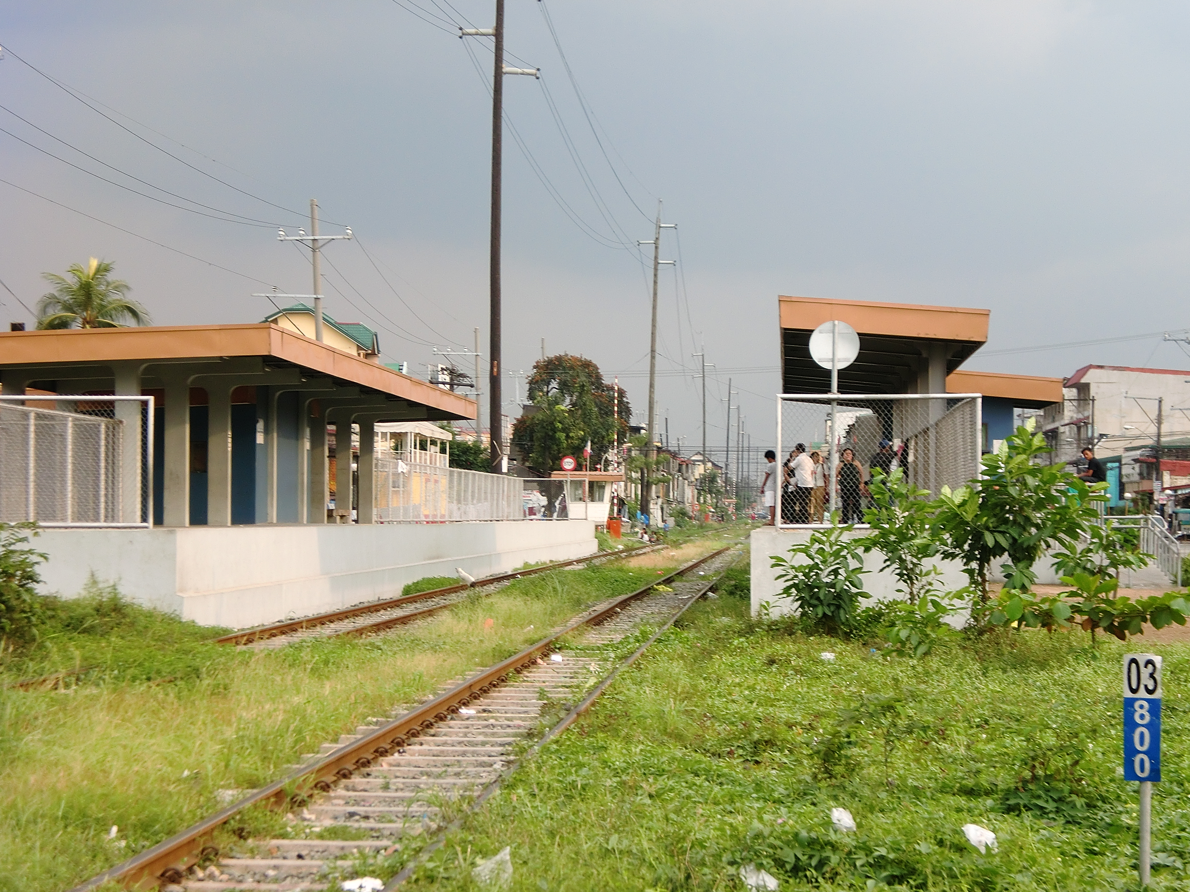 Laong Laan railway station in Manila, Philippines